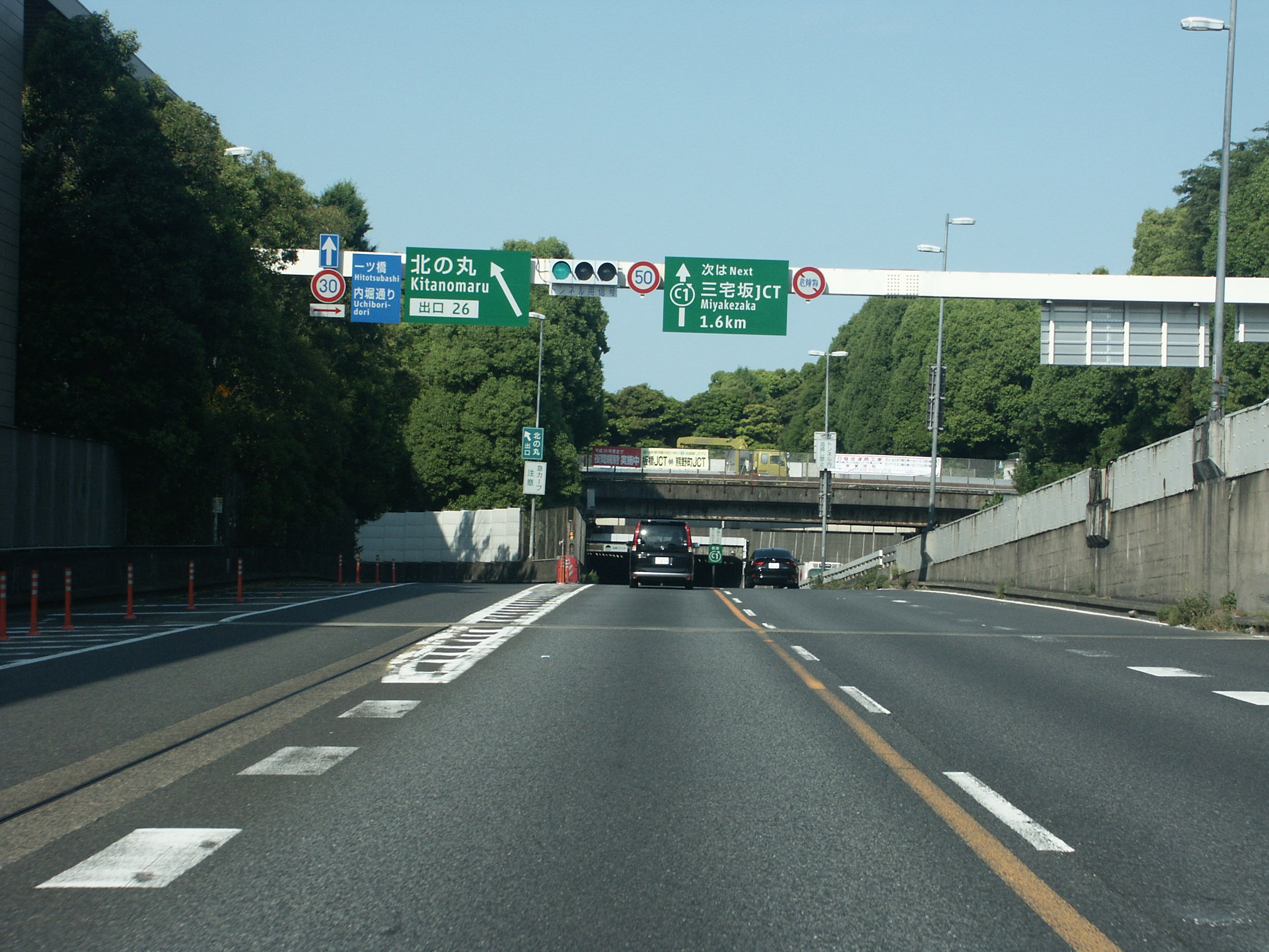 首都高速道路都心環状線北の丸出口付近